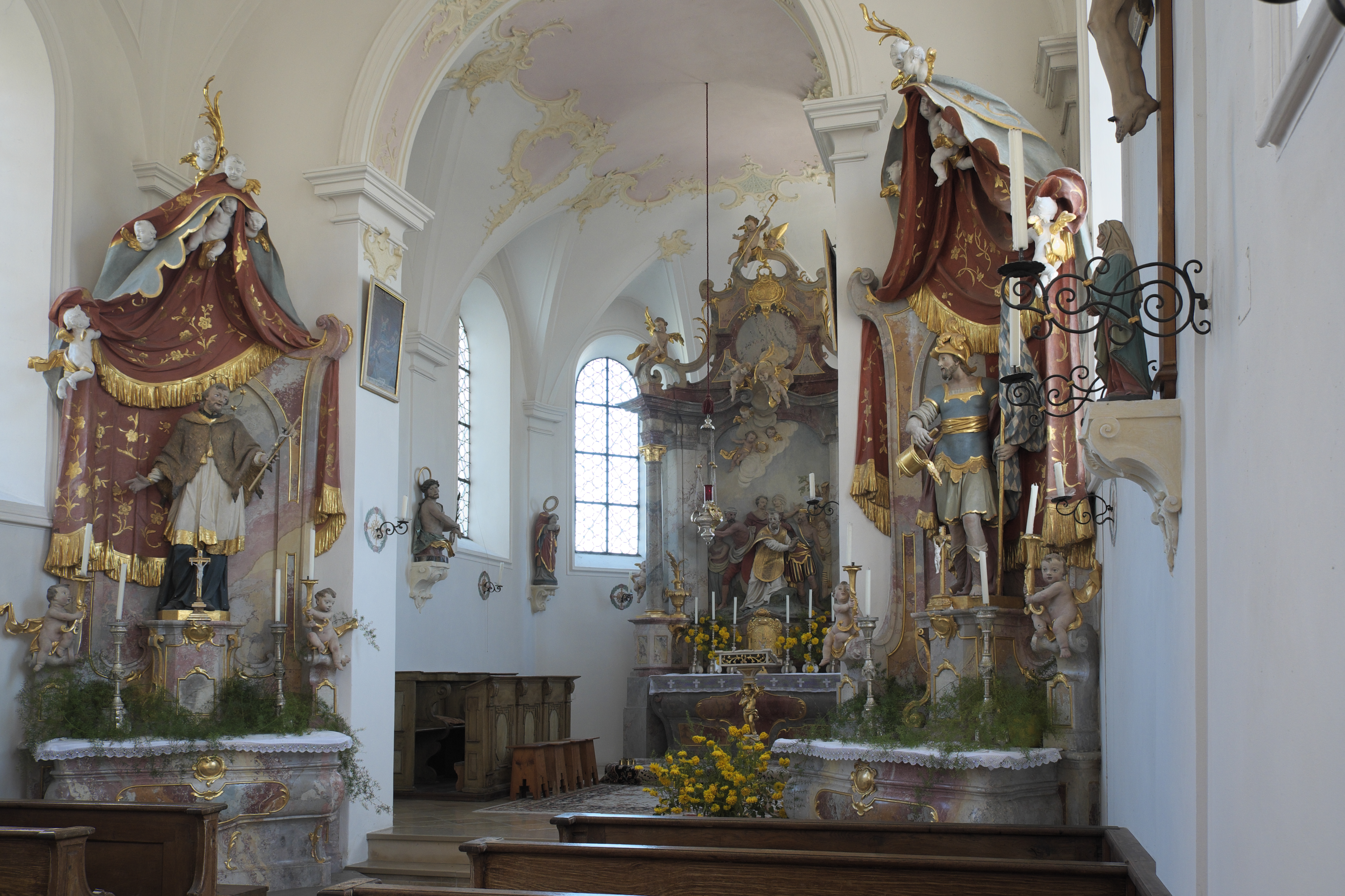 Katholische Filialkirche St. Alabn in Dießen am Ammersee im Landkreis Landsberg am Lech (Bayern/Deutschland), Innenraum